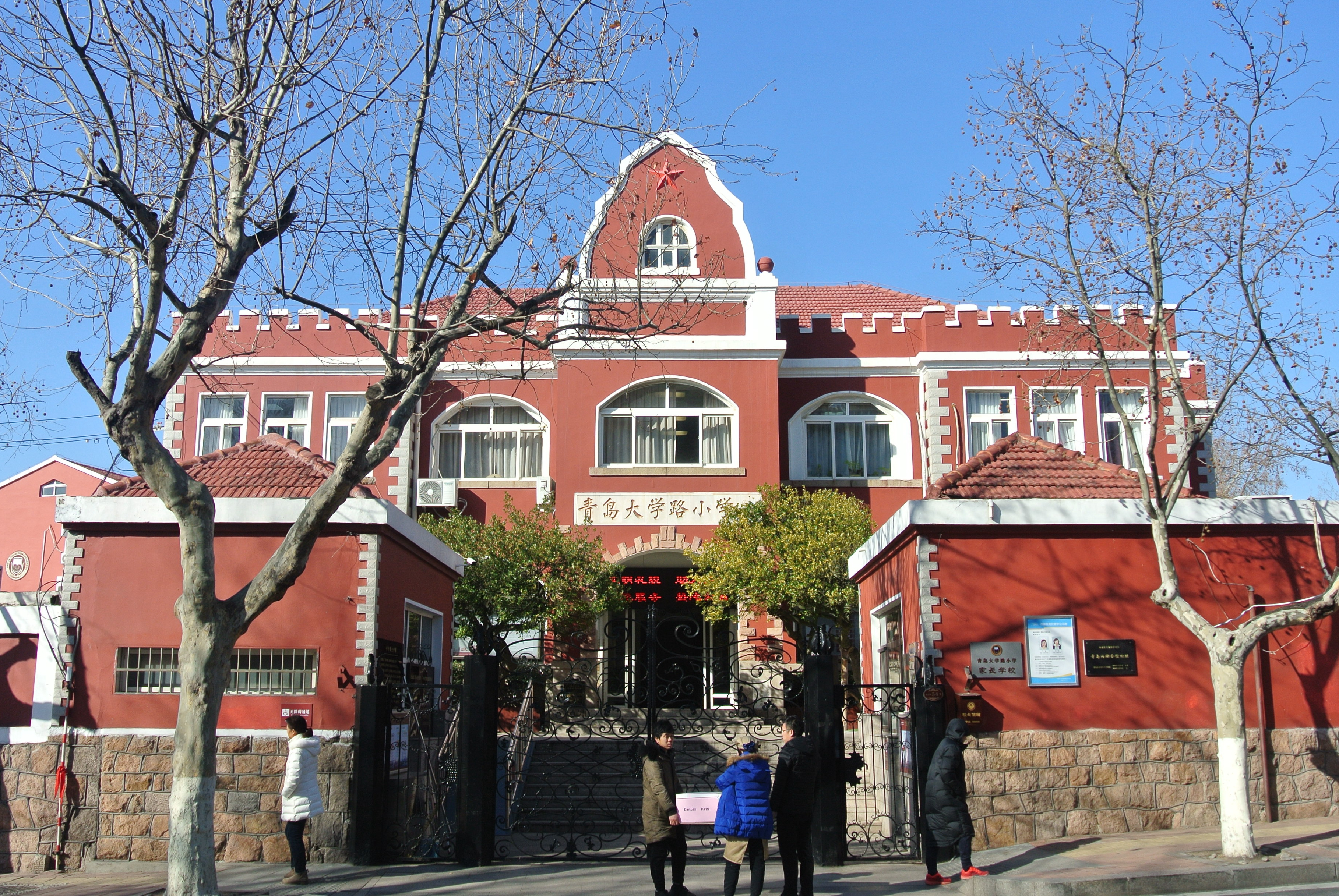 青岛两湖会馆旧址